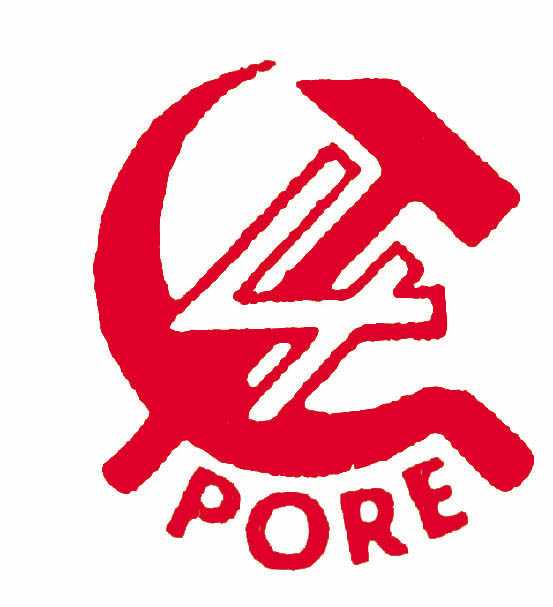 Logo del PORE (1974-1993)